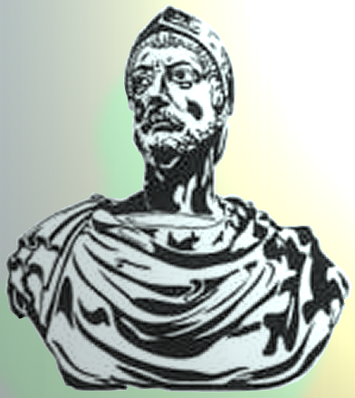 Elaborazione al computer dell'immagine del busto di Annibale effettuata da Horatius in data 01.04.05 Afbeelding:Hannibal Barkas.png